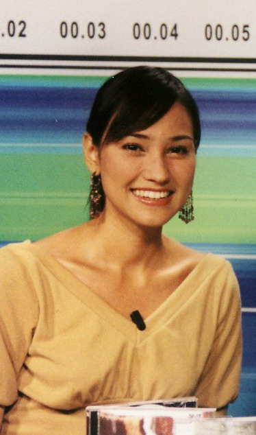 Janesuda Parnto in 2002